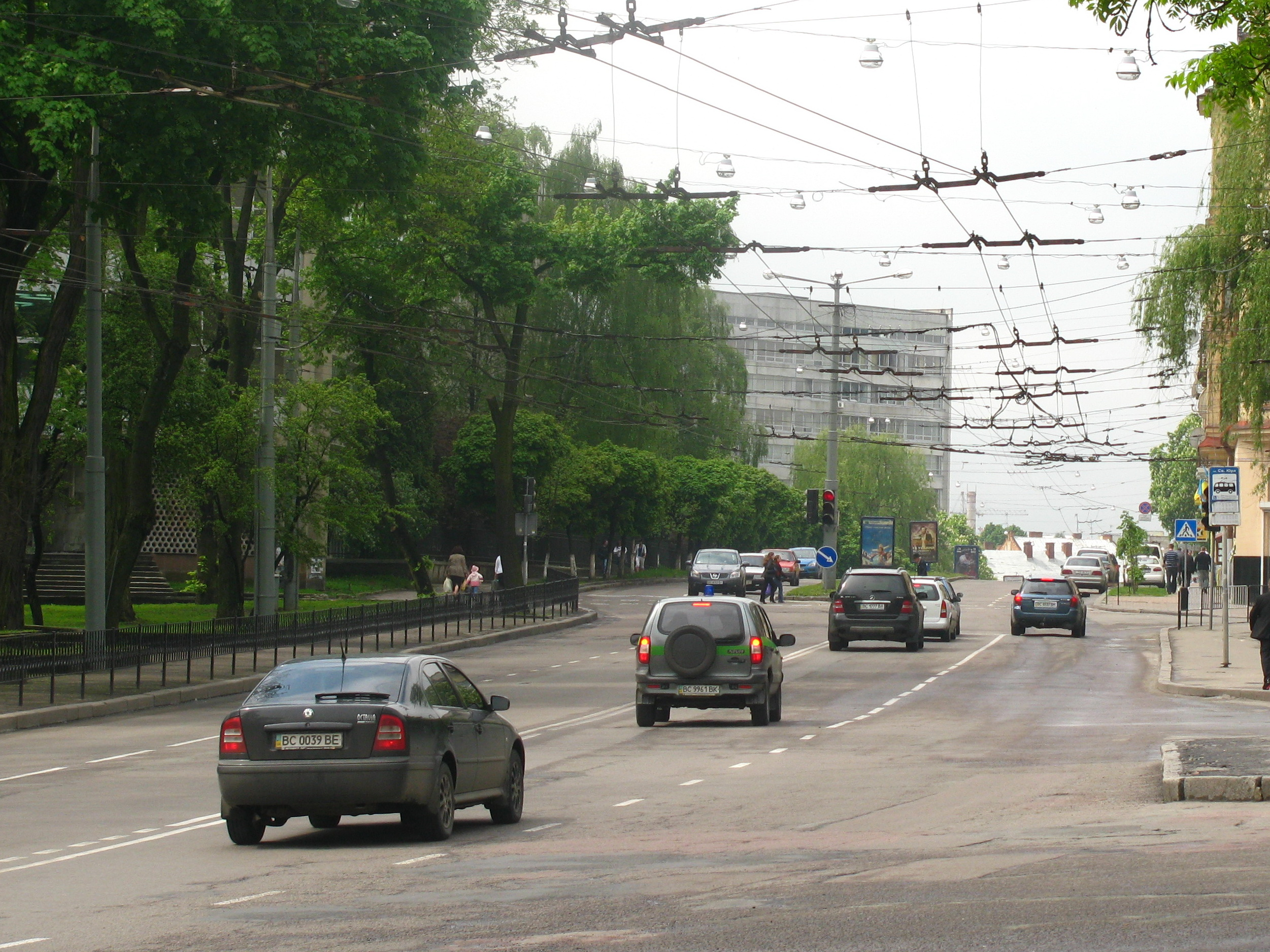 Вулиця Митрополита Андрея.jpg: початок вулиці Митрополита Андрея у Львові з площі Святого Юра